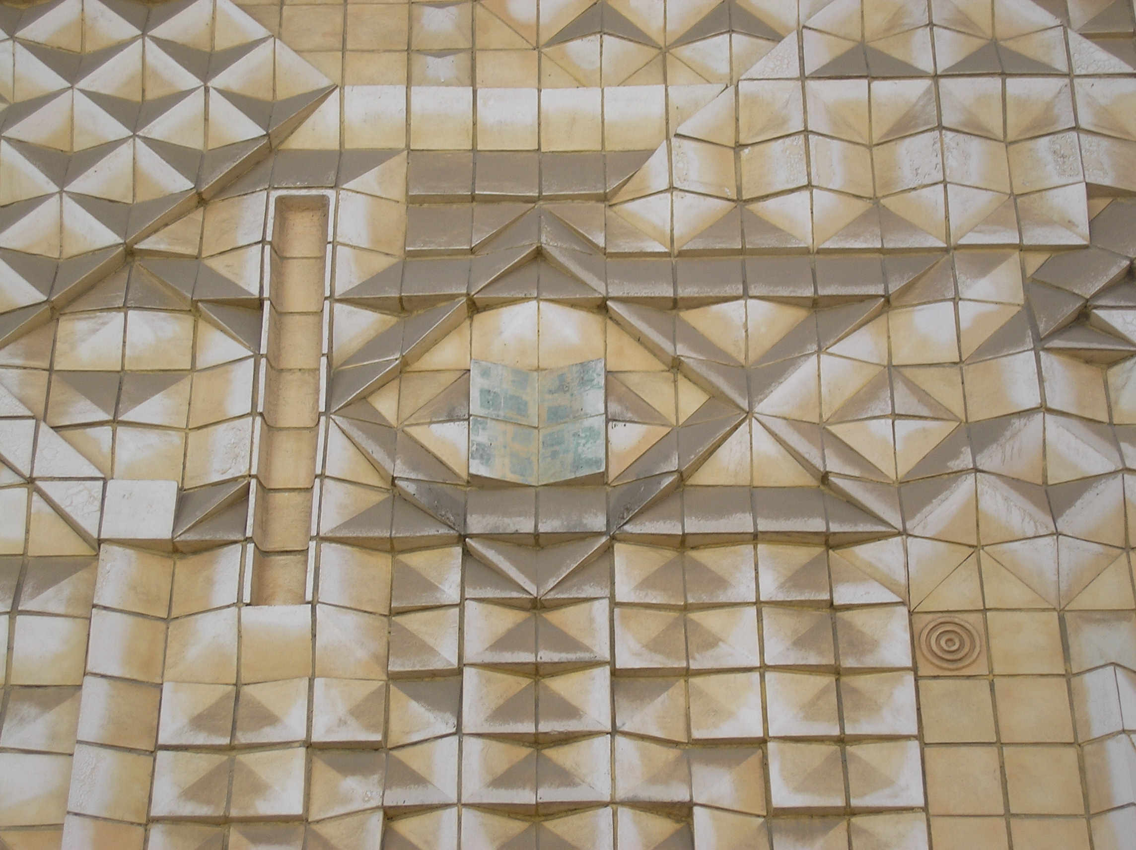 Ceramic Relife